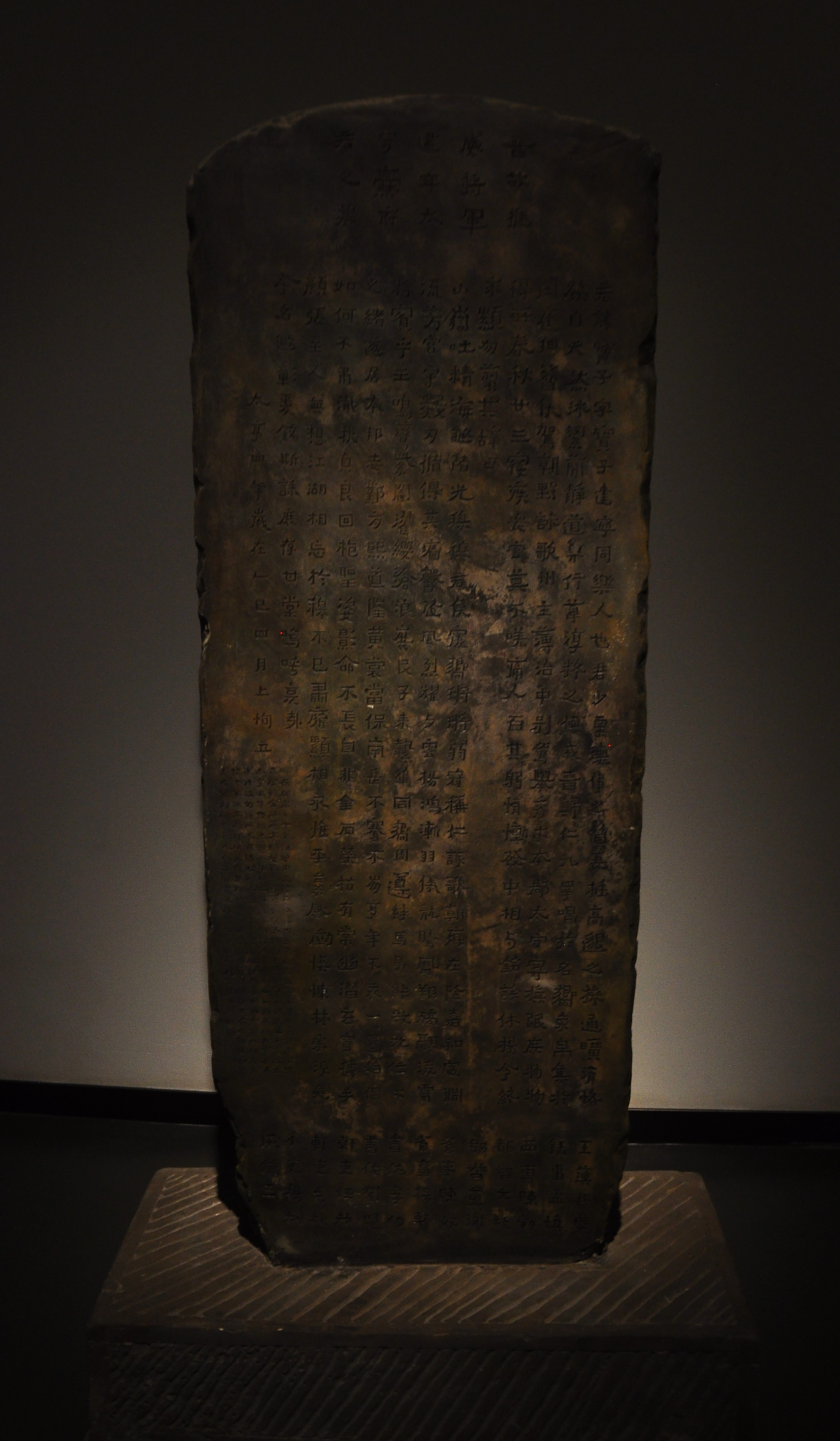 中文（中国大陆）: 云南省博物馆-东晋-曲靖-爨宝子碑复制品